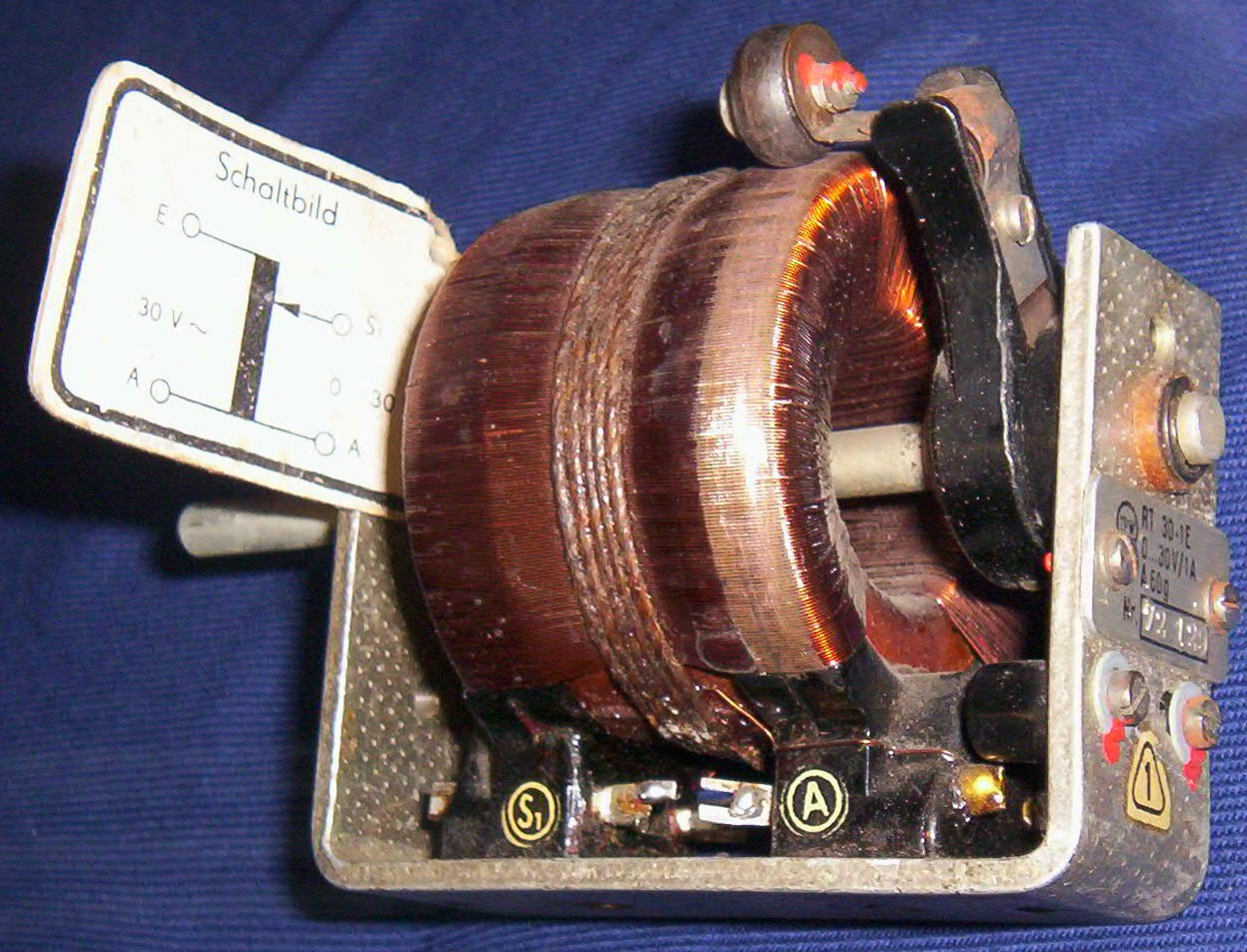 Kleiner Sparstelltransformator (0...30V/1A), Durchmesser ca. 55mm andere Versionen: ...